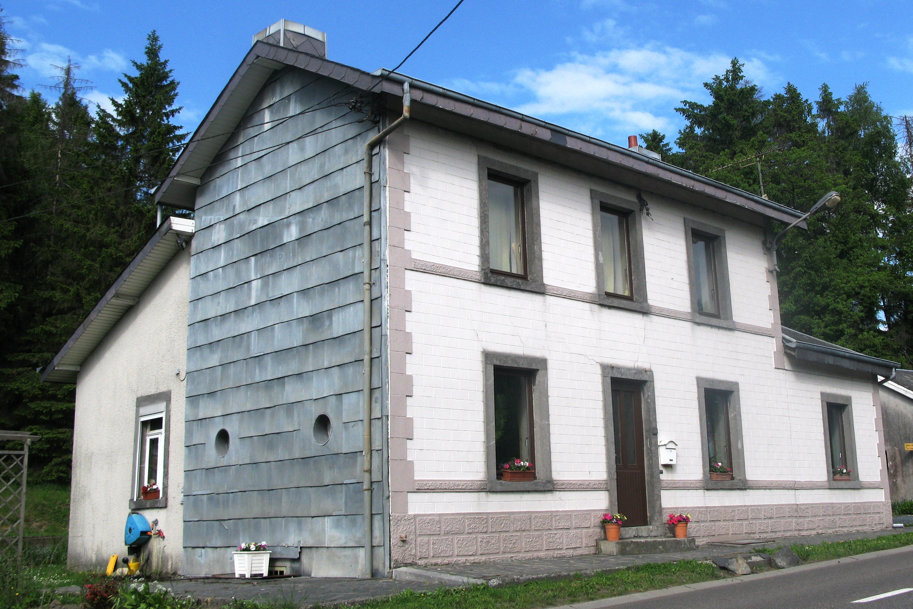 Gebai vun der Linn 164 tëscht Baaschtnech an Neffe laanscht d'N 874.